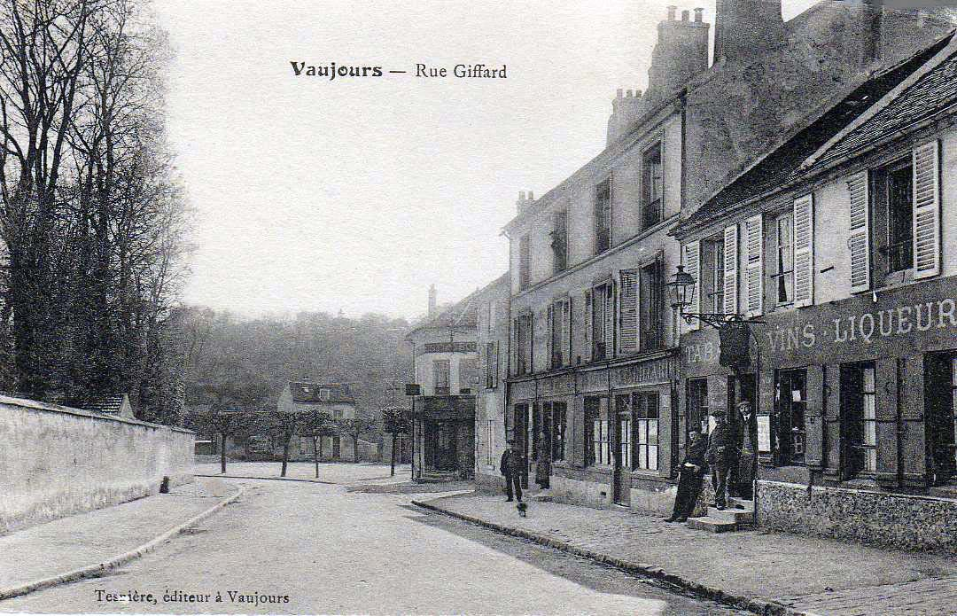 Vaujours (France)- Rue Giffard vers 1900